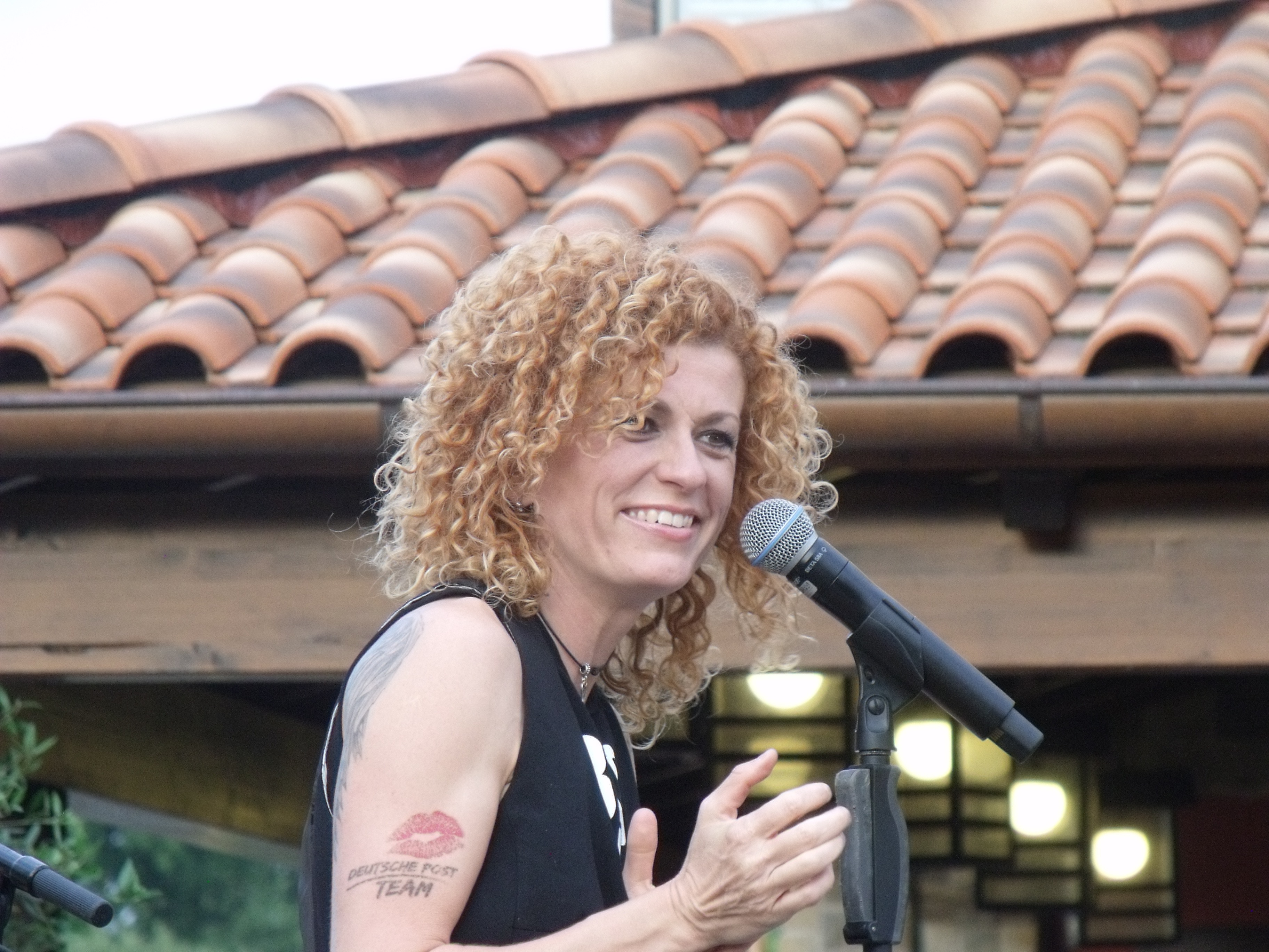 Lucy Diakovska bei der Summer Party- Tour in der Fina Bar Celona in Oldenburg